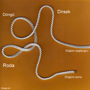 Düğüm bileşenleri.